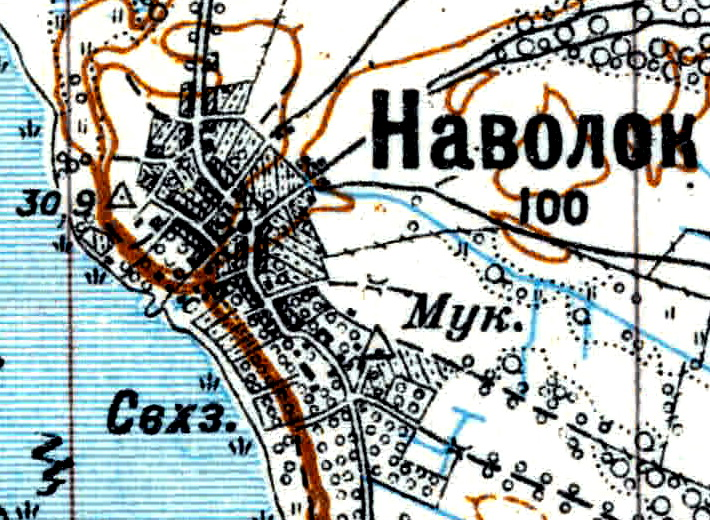 Топографическая карта Ленинградской области, квадрат Vc-29 (Батецкая), деревня Наволок